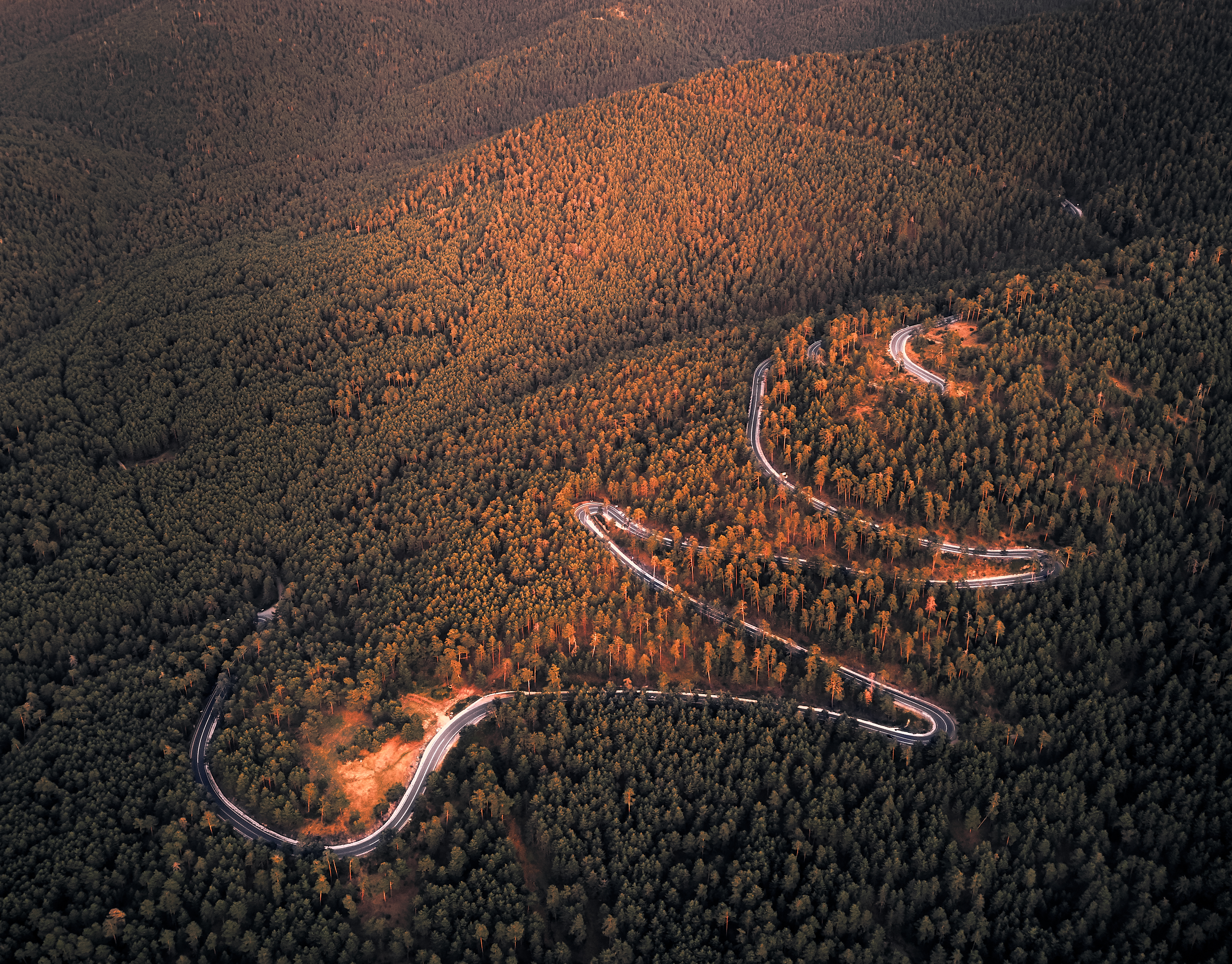 las 7 revueltas